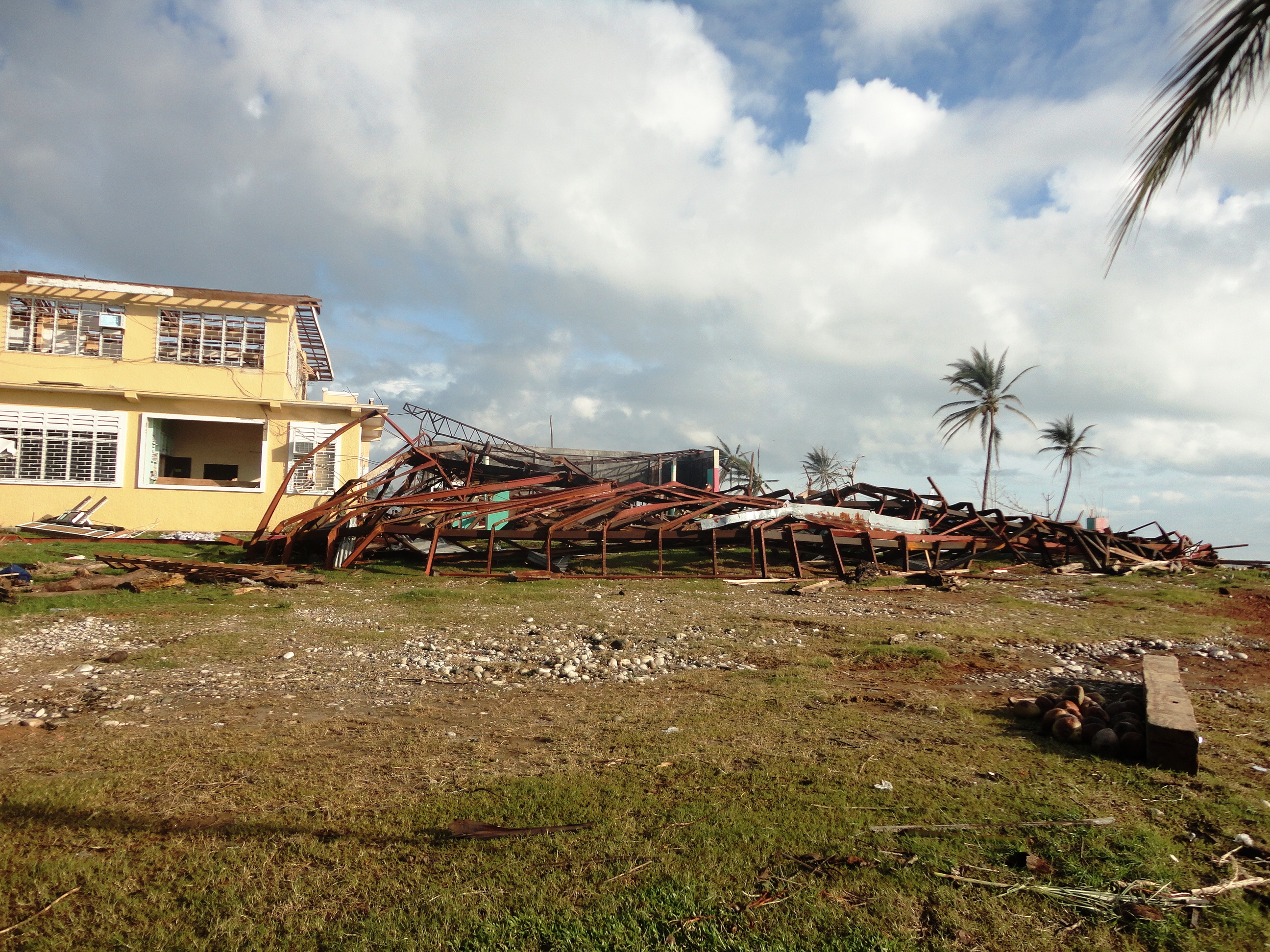 Orig. Flickr description: Municipal gymnasium.